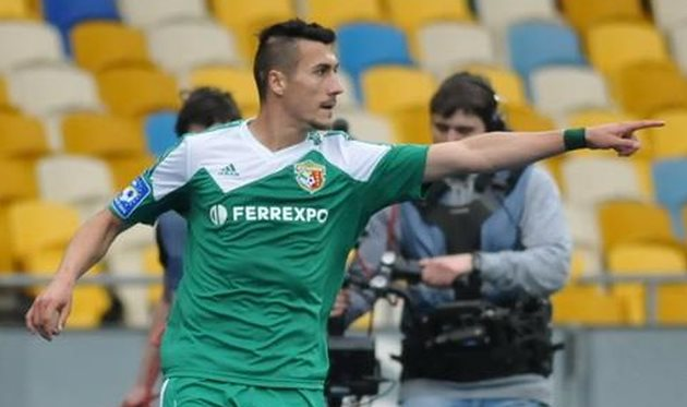 Адис Яхович